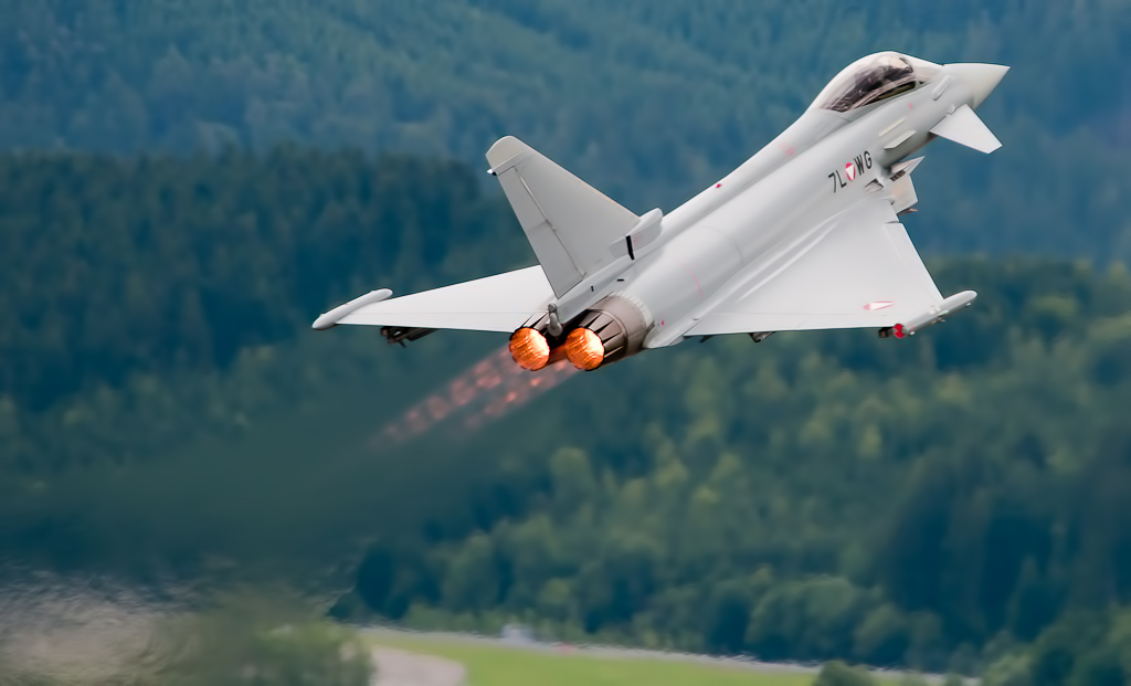 Eurofighter Typhoon na pokazach AirPower w Zeltweg 2011